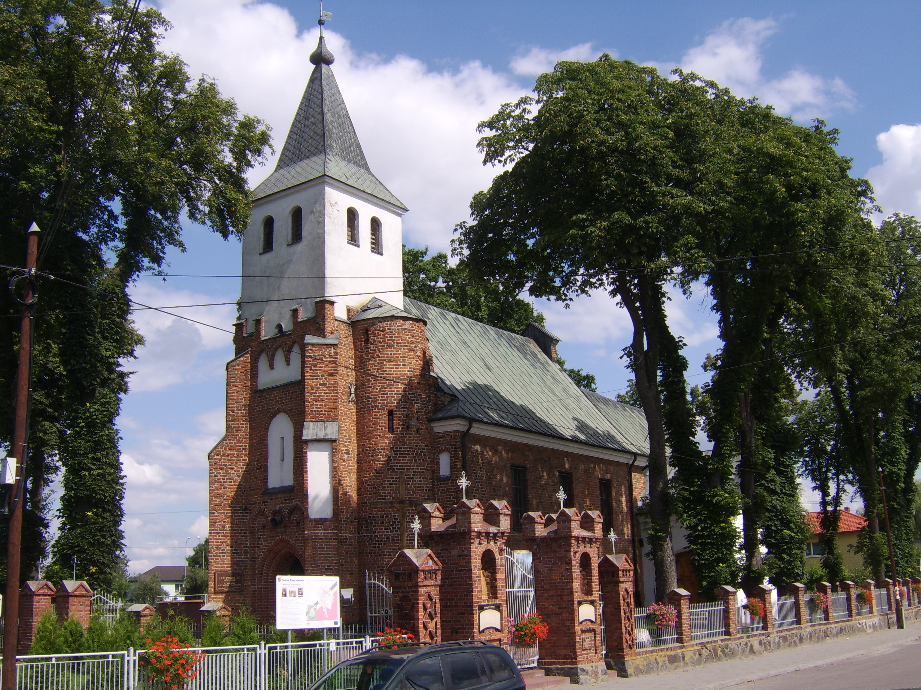 Kościół parafialny pw. św.Bartłomieja we wsi Czernikowo, województwie kujawsko-pomorskim, w powiecie toruńskim, w gminie Czernikowo (zabytek nr rejestr. A/707)